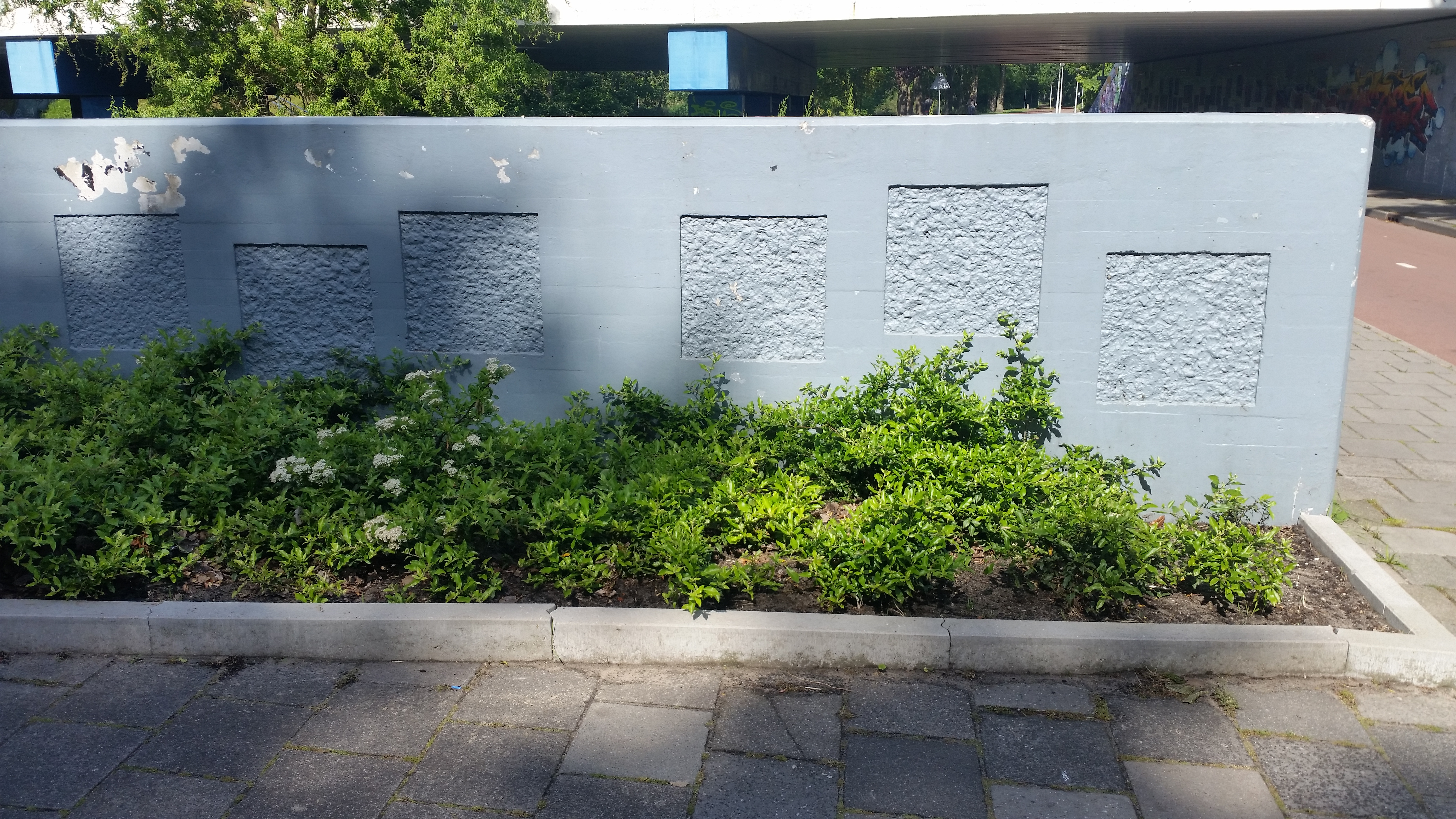 Betonrelïefs in borstwering Brug 901 (in Amsterdam)